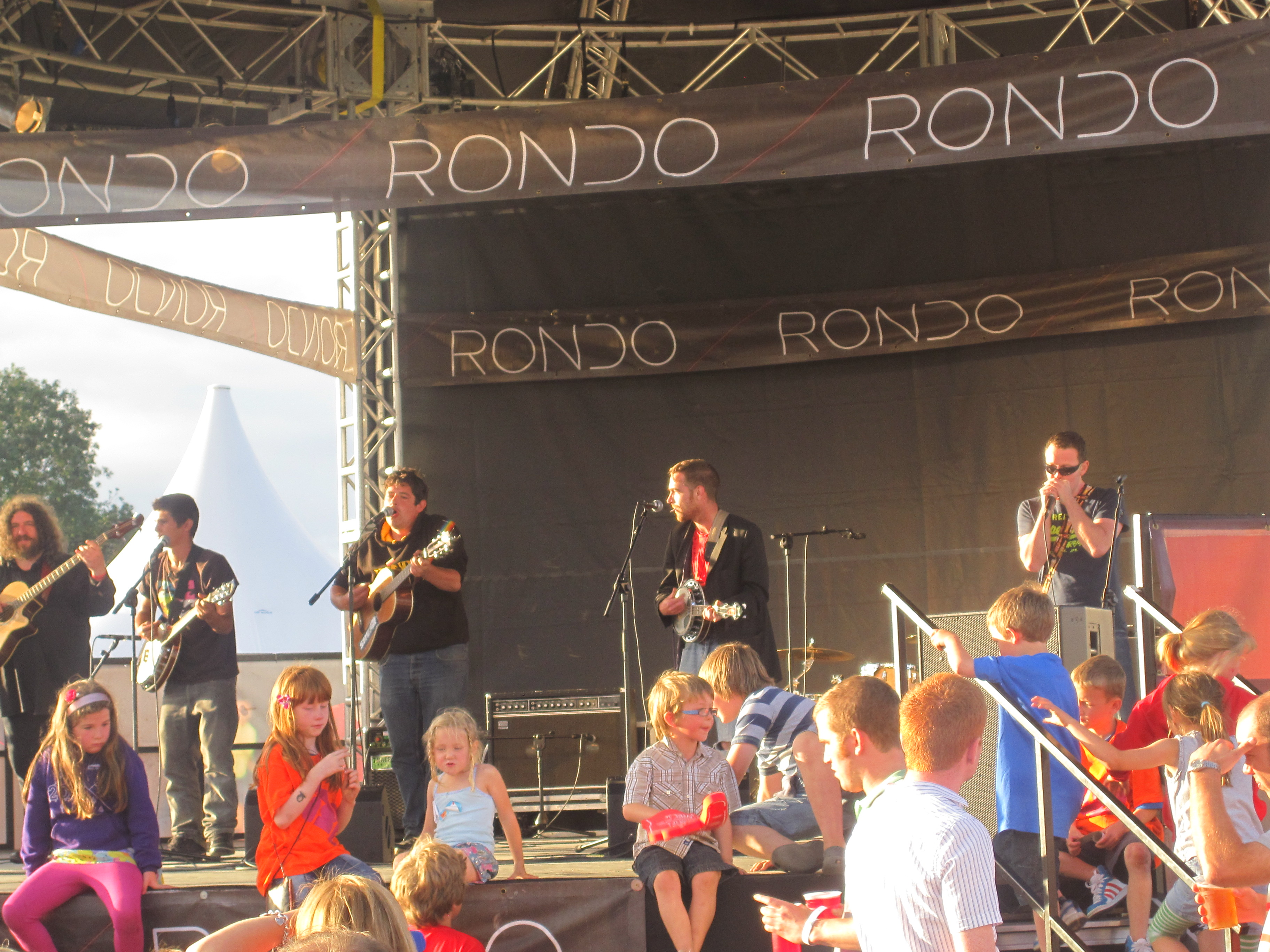 Gwibdaith Hen Fran wrthi ar un o lwyfanau'r maes yn Eisteddfod Wrecsam, 2011.